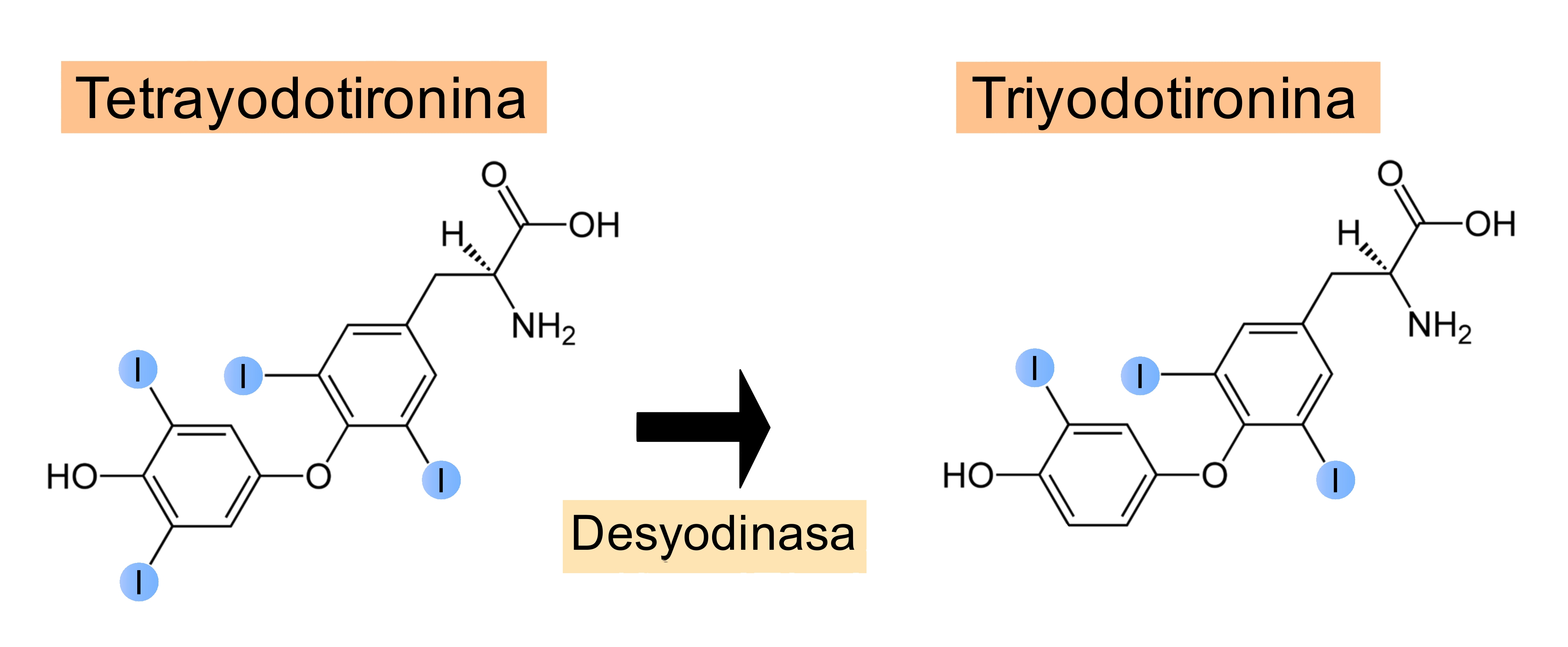 Esquema en el que representa la transformación de la prohormona tetrayodotironina en triyodotironia por la acción de la enzima desyodasa.